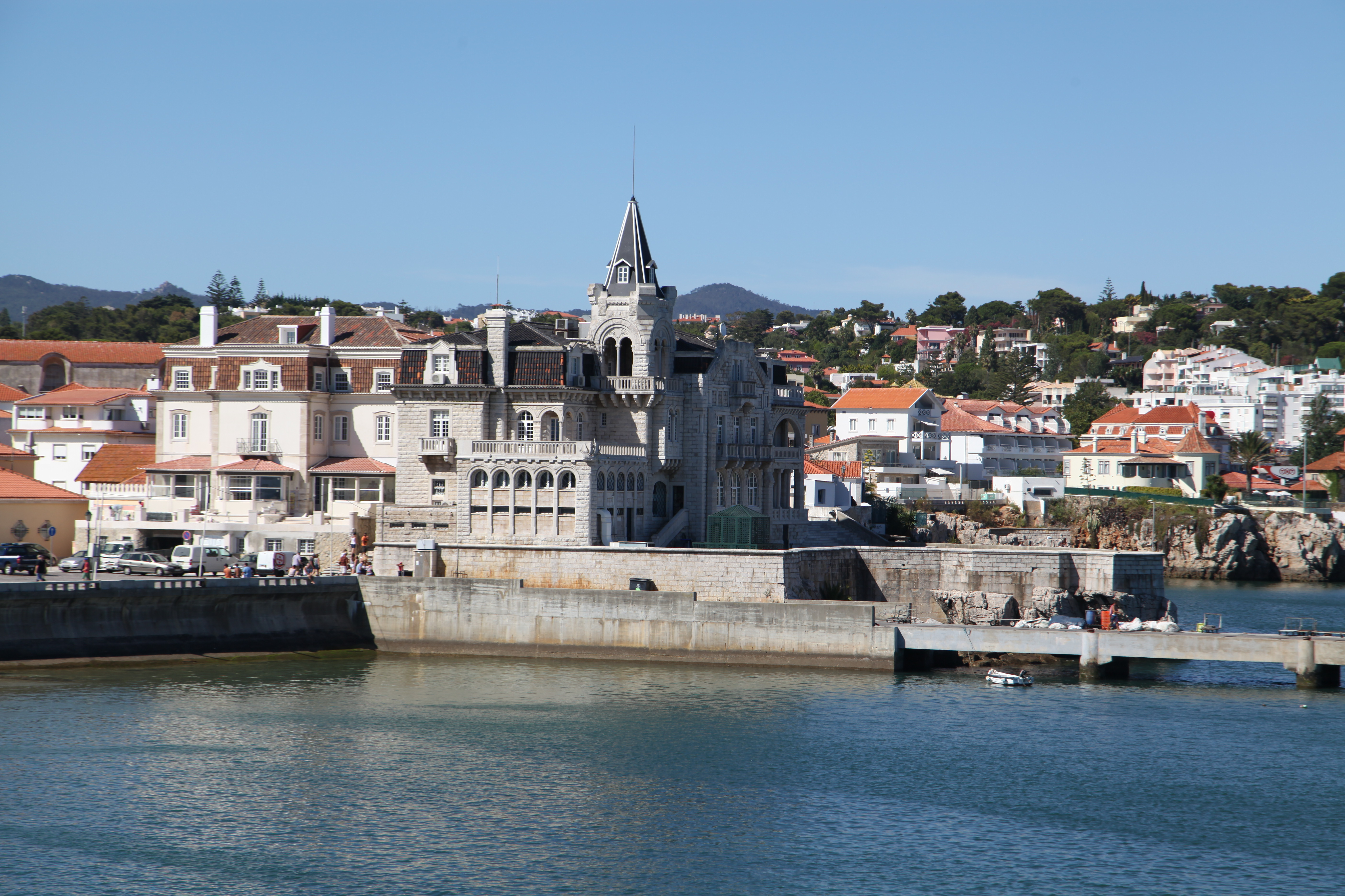 Cascais